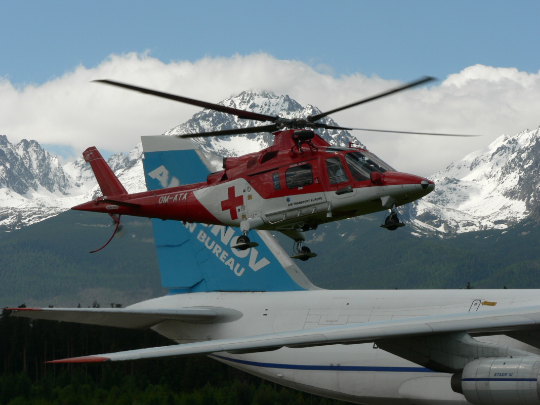 Agusta A109K2 na popradskom letisku - Slovakia